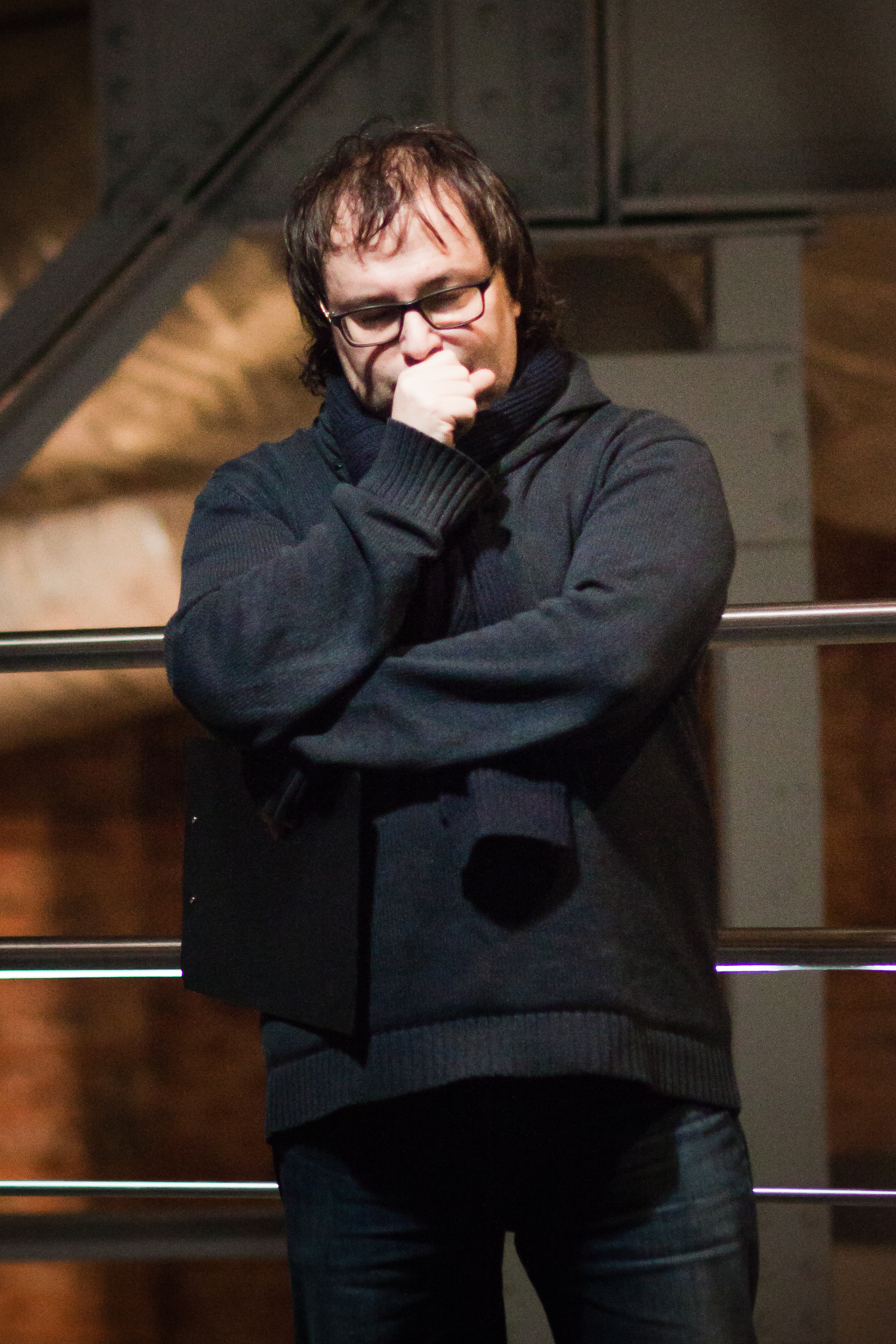 Александр Кушнир на лекции об Илье Кормильцеве в Еврейском музее и Центре толератности